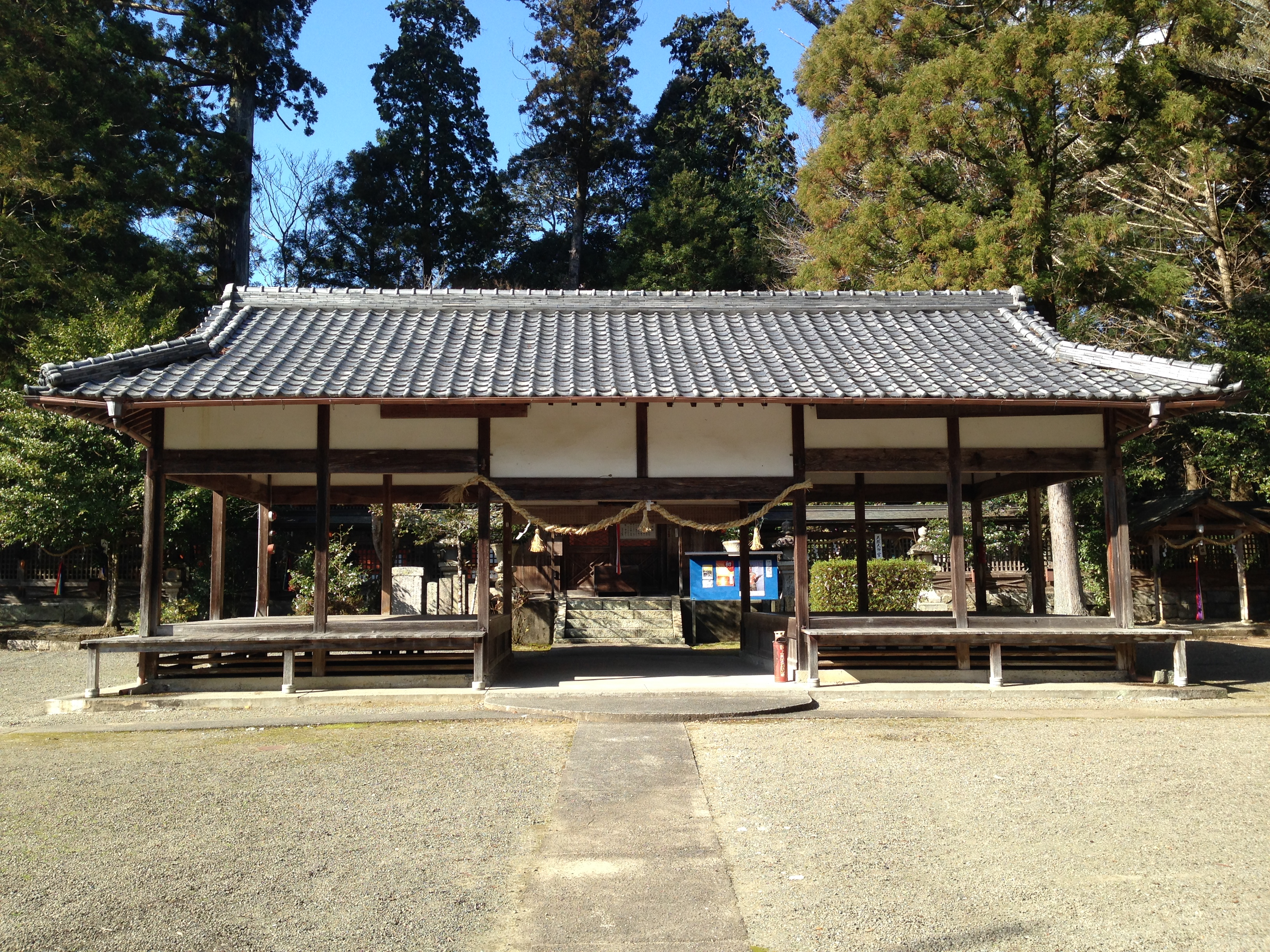 十三神社の拝殿。礼拝（賽銭）場所は通り抜けた先の鈴門にある。